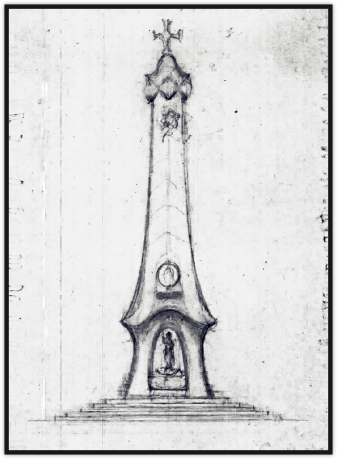 Monumento a Torras i Bages, de Antoni Gaudí (1916).